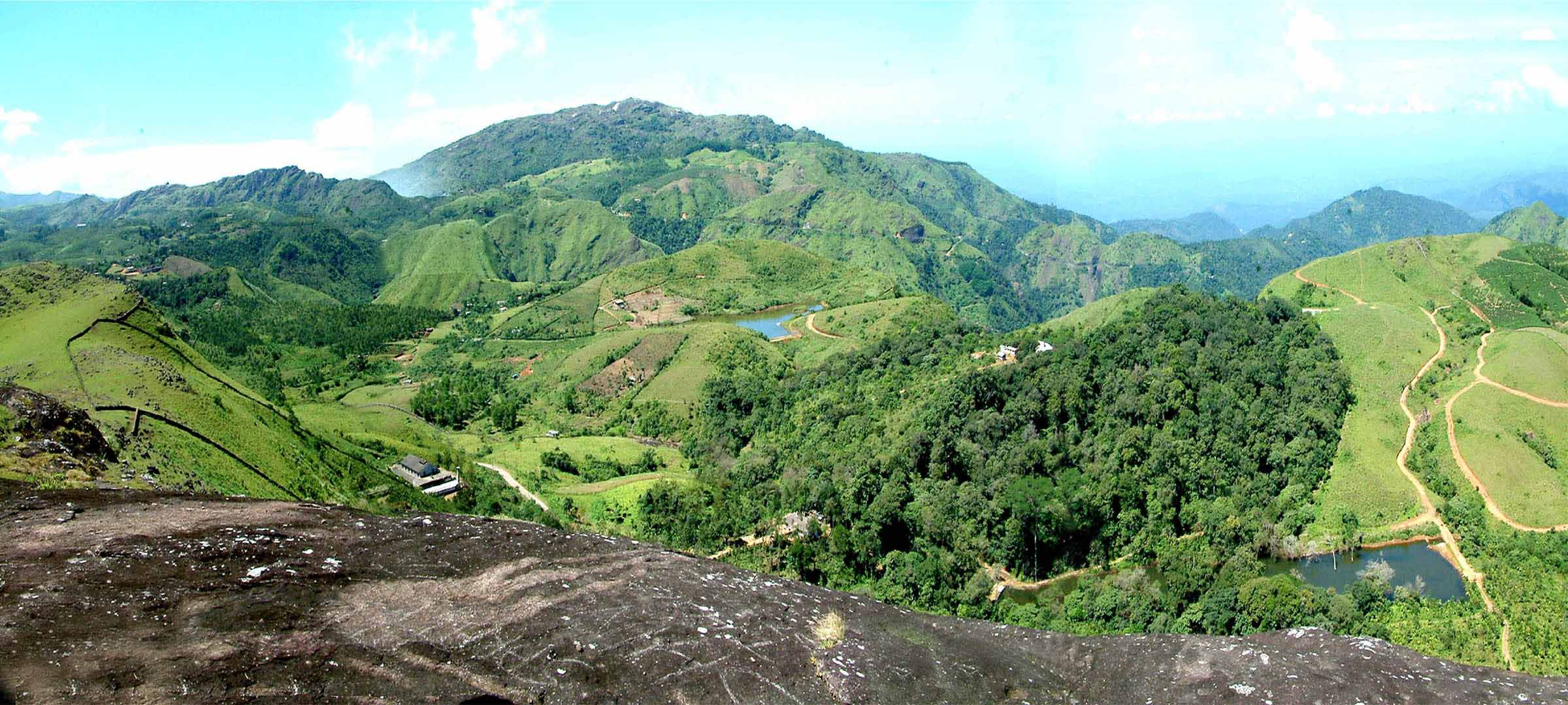 ചിത്രമെടുത്തത്: കെ.എം.എ. കരീം, യമഹ സ്റുഡിയോ, ഈരാറ്റുപേട്ട